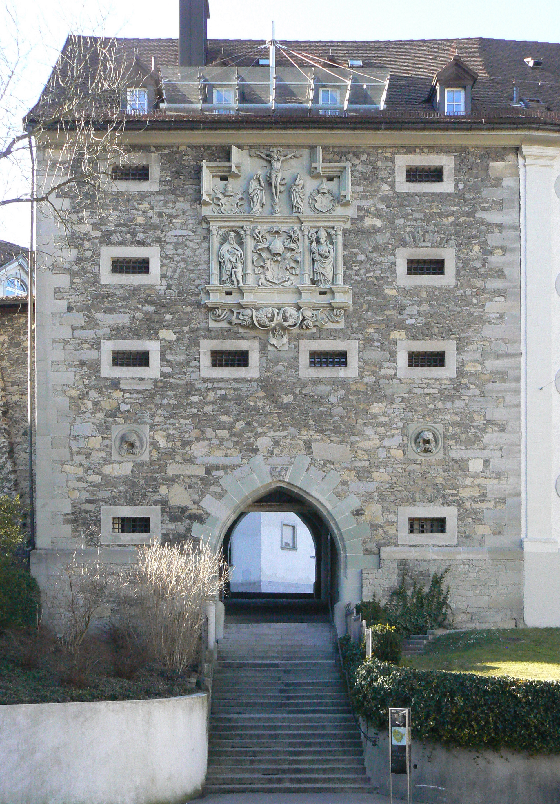 Das Karlstor (Abtstor) in St. Gallen, gebaut um 1566